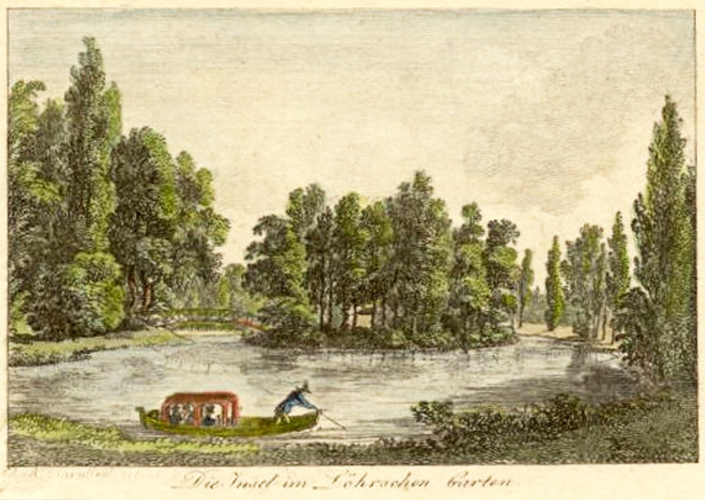 Die Insel im Teich von Löhrs Garten in Leipzig. Kolorierter Stich